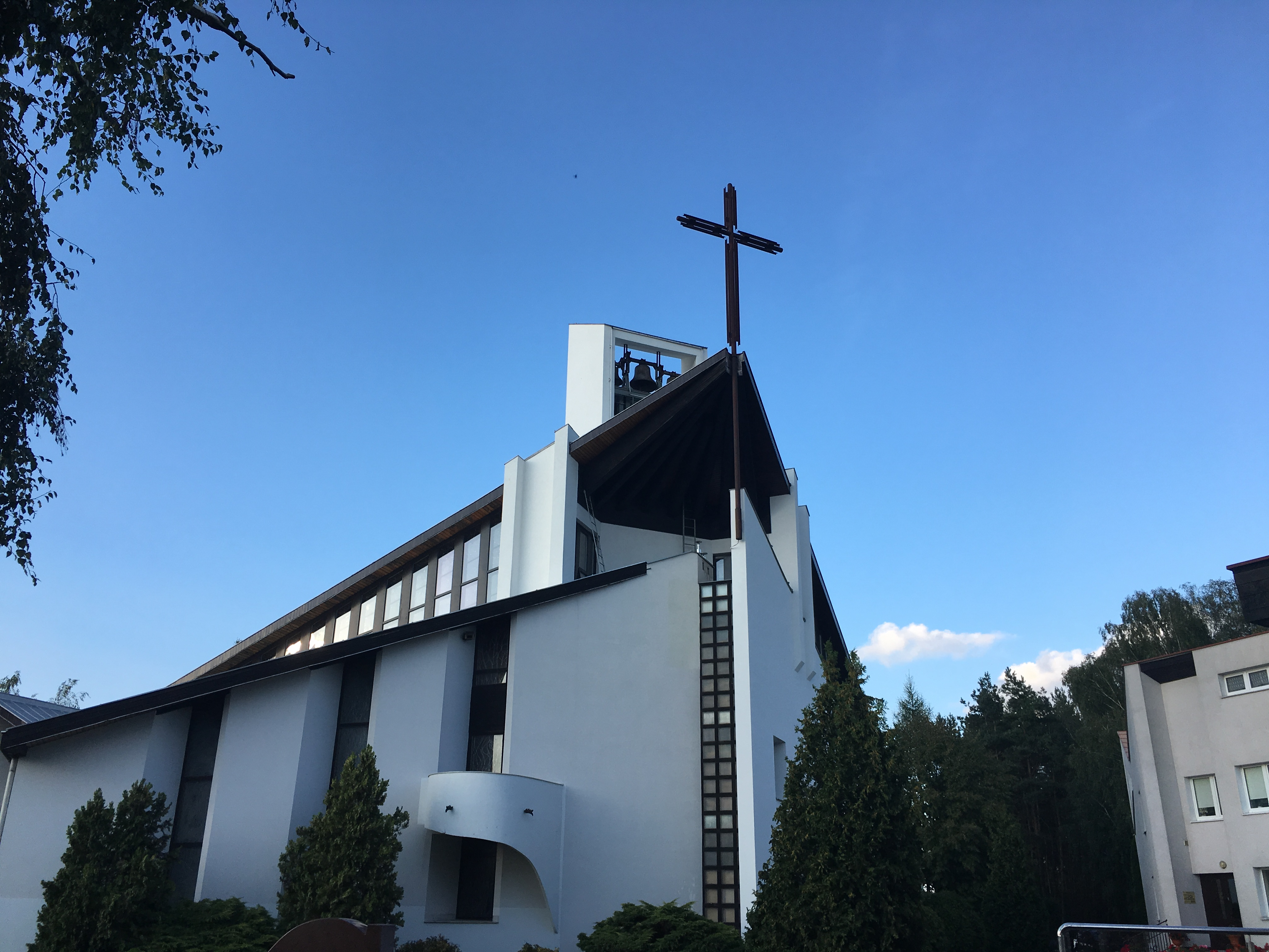 Kościół Najświętszego Serca Pana Jezusa (NSPJ) w Starogardzie Gdańskim-Łapiszewie.